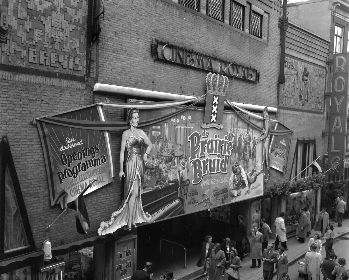 Gevel Cinema Royal met tekst "Ars longa, vita brevis", na restauratie, De Prairie Bruid (The Gal Who Took the West, regie: Frederick De Cordova, 1949 met o.a. Yvonne De Carlo, Charles Coburn en John Russell) als openingsvoorstelling, Nieuwendijk, Amsterdam, 4 september 1950. Foto Ben van Meerendonk / AHF, collectie IISG, Amsterdam